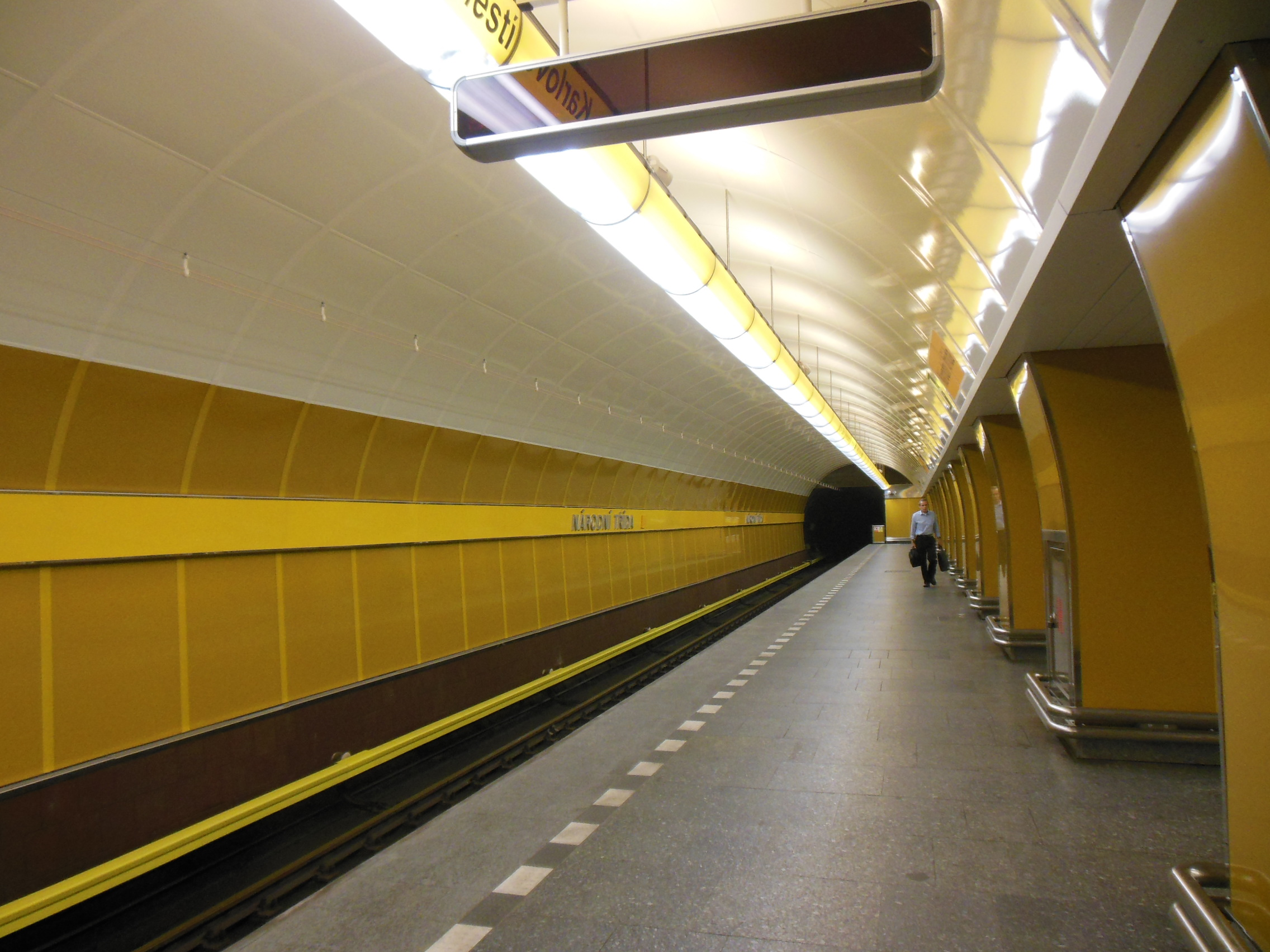 Praha-Nové Město. Stanice metra B Národní třída, stav po rekonstrukci 2012-2014.